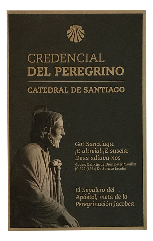 Foto vom Pilgerpass der Kathedrale zu Santiago de Compostela